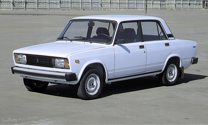 Lada 21053